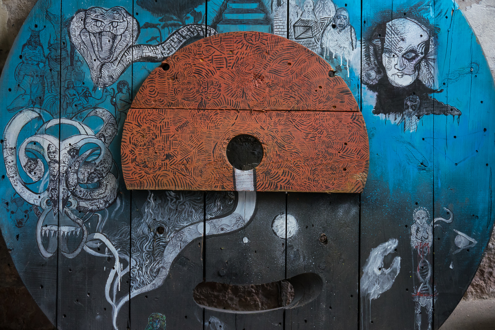 Atocha